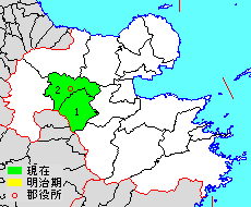 大分県玖珠郡の範囲